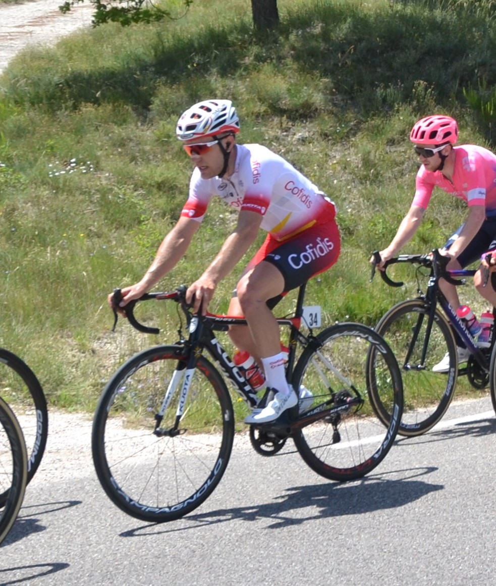 Emmanuel Morin lors du Mont Ventoux Dénivelé Challenges 2019